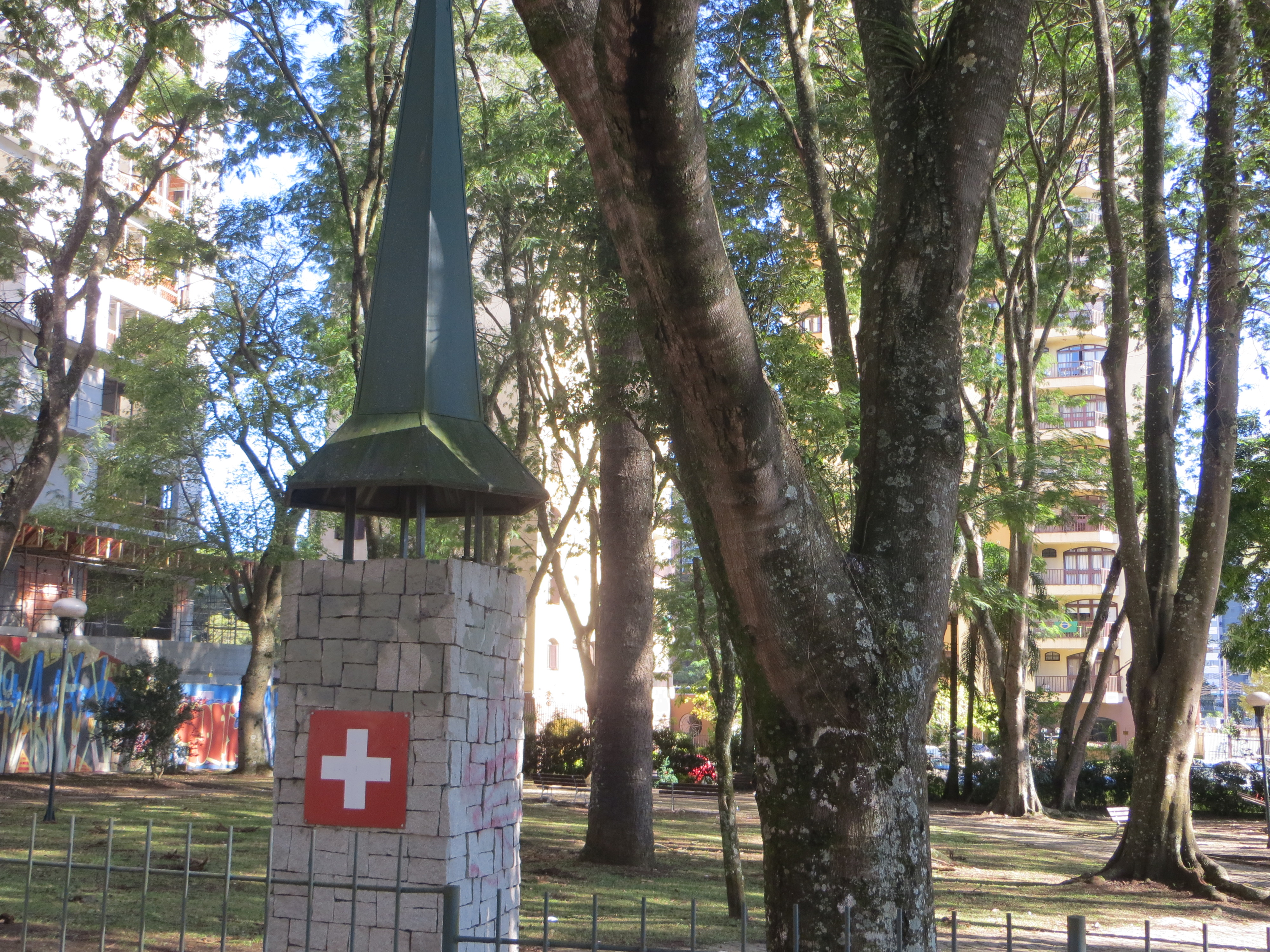 Praça Suíça, no bairro do Cabral, município de Curitiba, capital do estado brasileiro do Paraná, região Sul do Brasil.